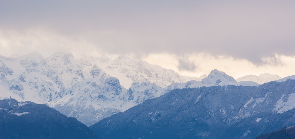 Cima Carega, Baffelan, Cornetto da Rubbio (Conco)